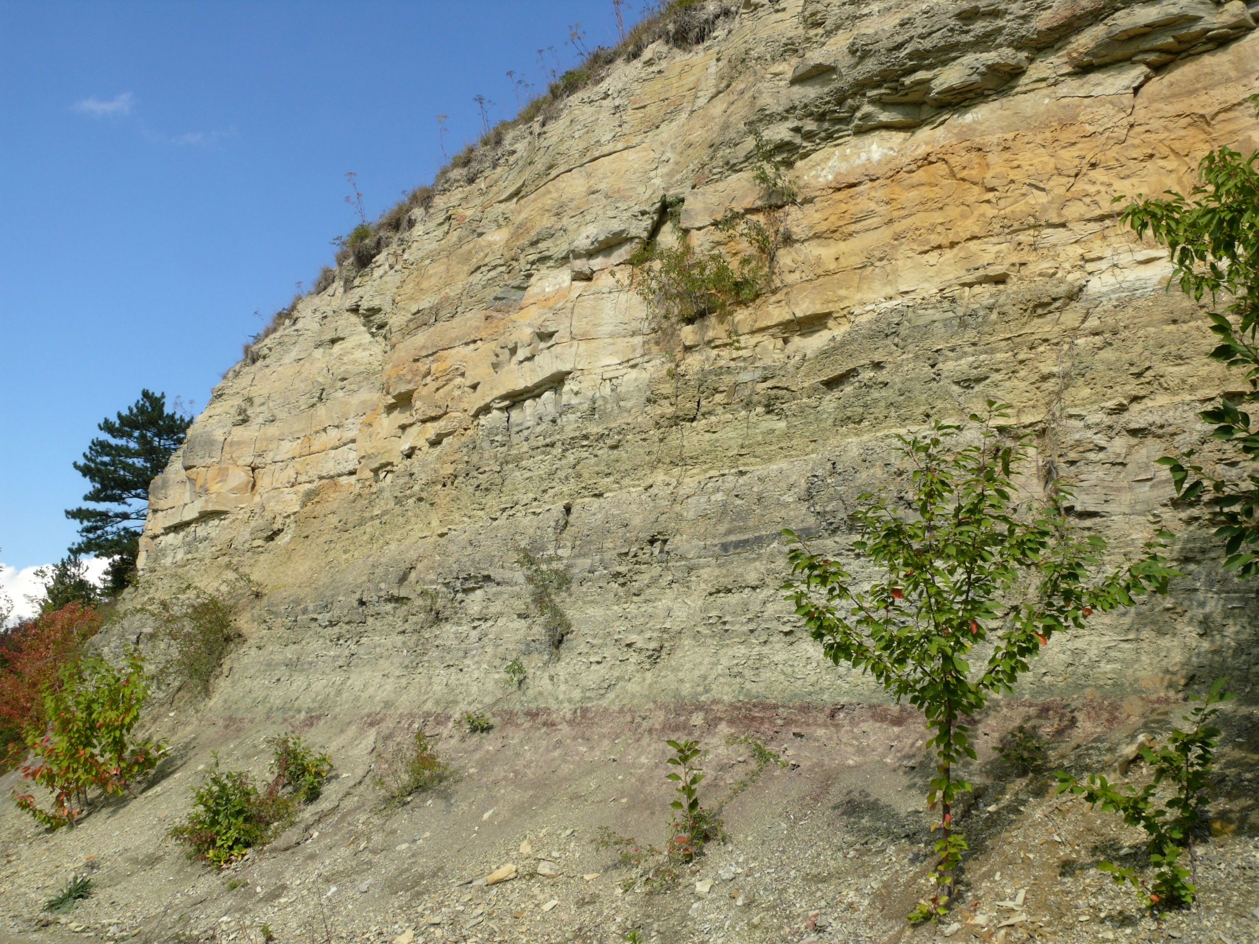 Übergang des Buntsandstein zum Muschelkalk, Wegböschung am Kallmuth bei Homburg am Main